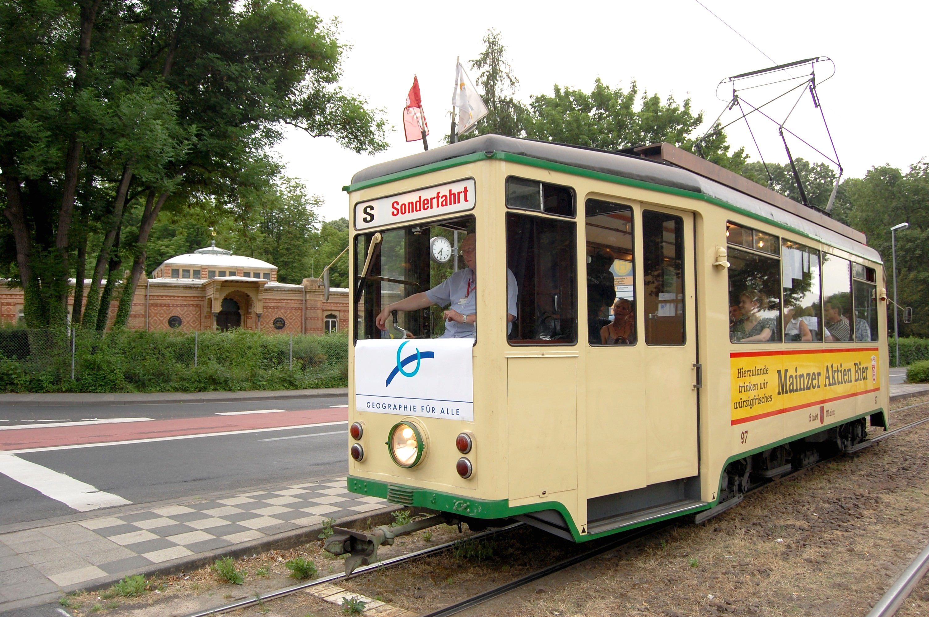 TRAMaturgie am 26.5.2007 Triebwagen 97 hält vor dem neuen jüdischen Friedhof in Mainz